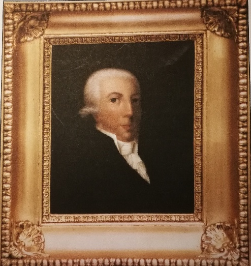 Das Bild zeigt Peter Bienemann von Bienenstamm. Das über 200 Jahre alte Ölgemälde befindet sich im Besitz von Elke Prasse geb. von Bienenstamm, die es Wikipedia zur Verfügung gestellt hat. Prasse war Musiklehrerin in Berlin.